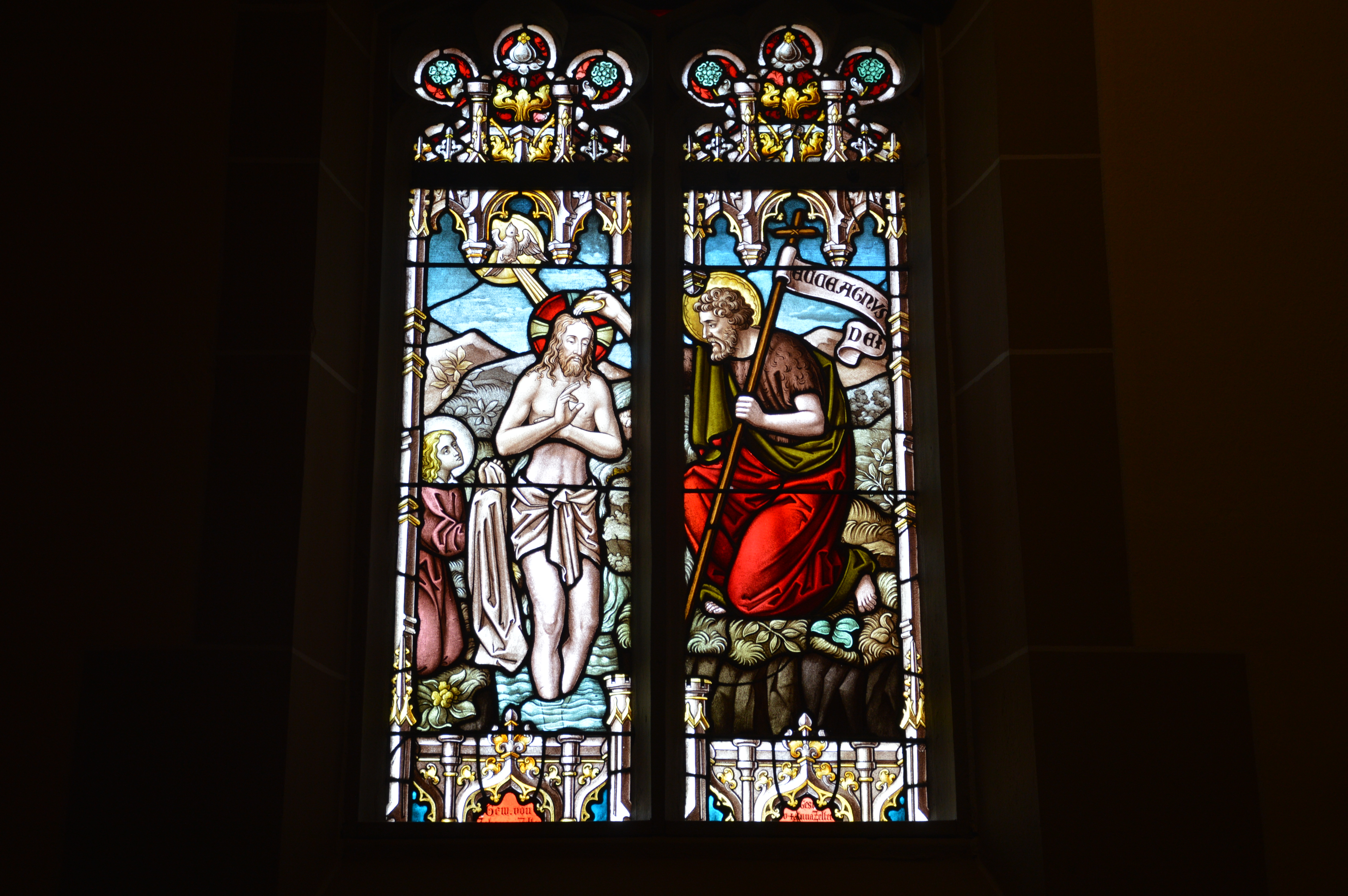 Tauffenster Pfarrkirche St. Matthäus Bad Sobernheim.jpg